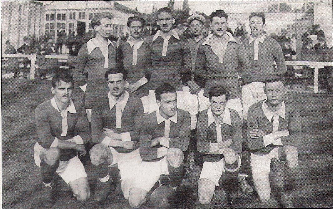 É quipe du SC Fives en 1922